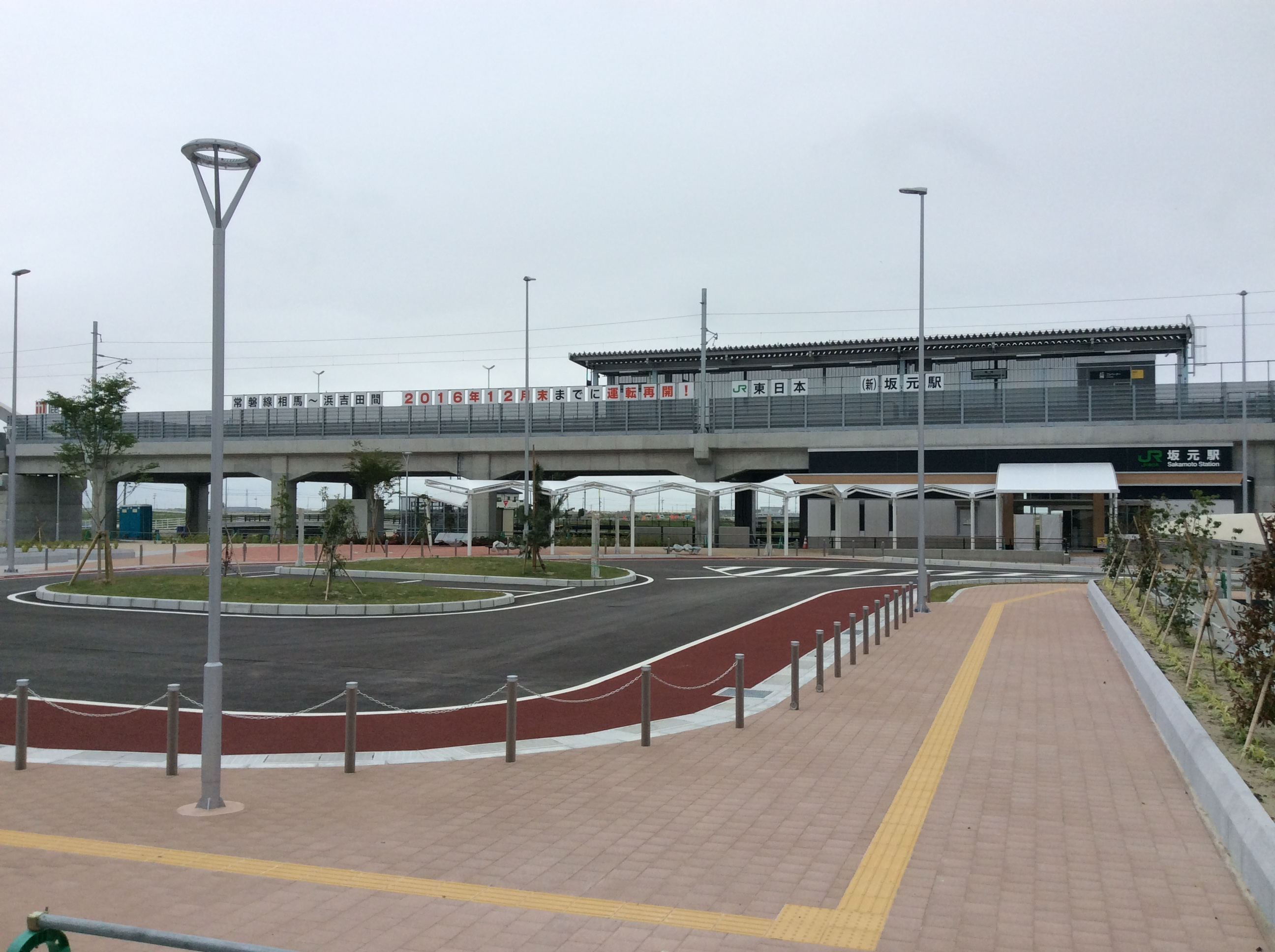 JR常磐線 坂元駅（新駅 開業前）